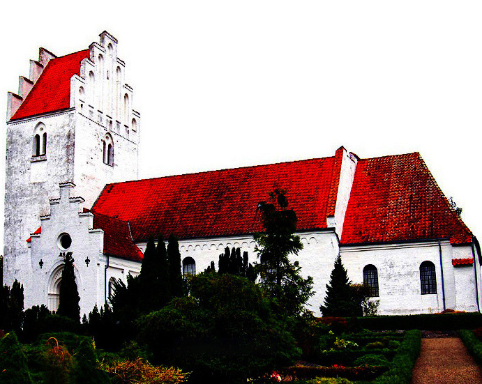 fra sydside